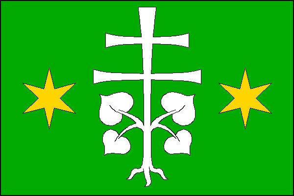 Vlajka obce Vysočany v okrese Blansko